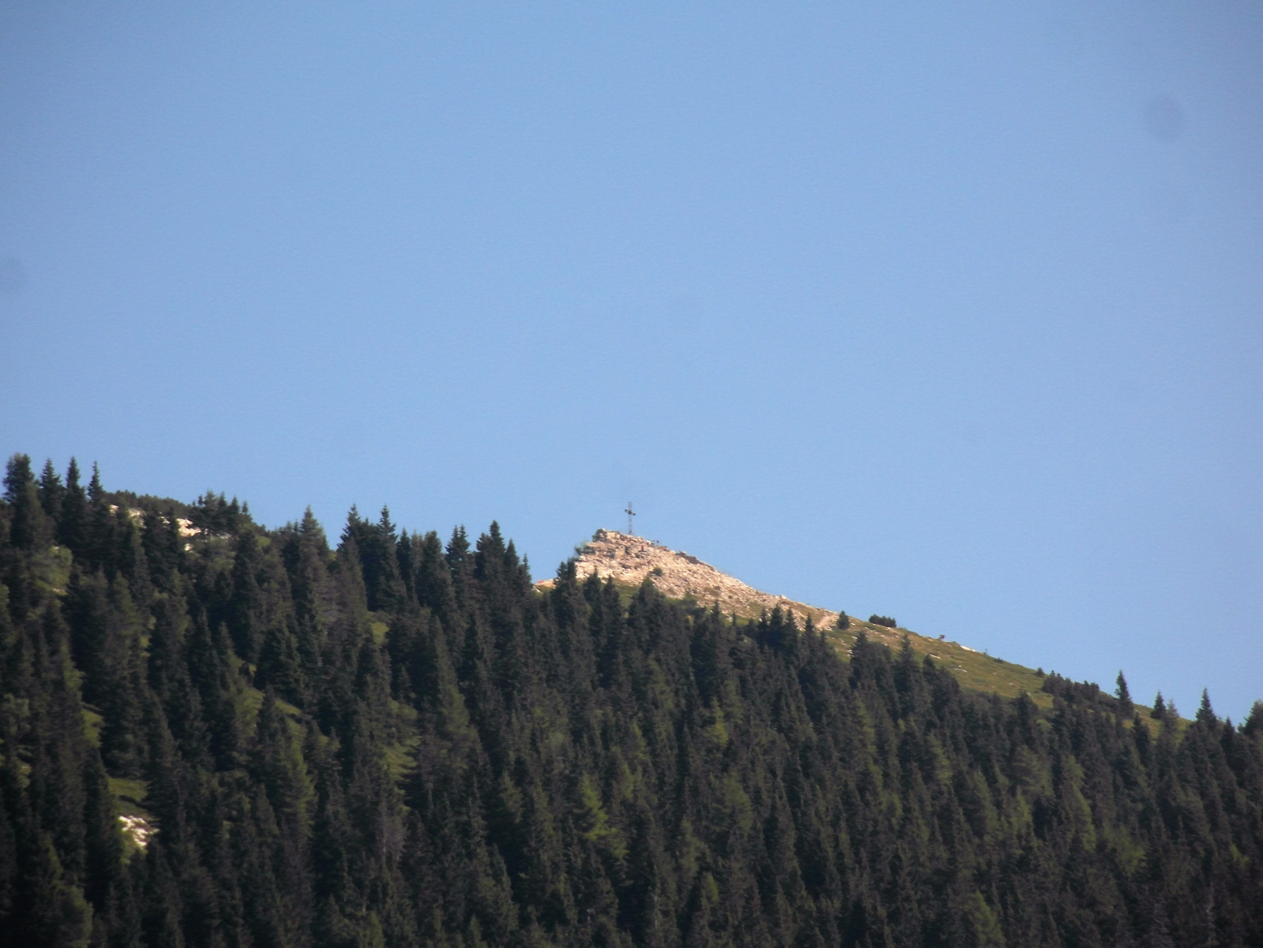 Forte Vezzena